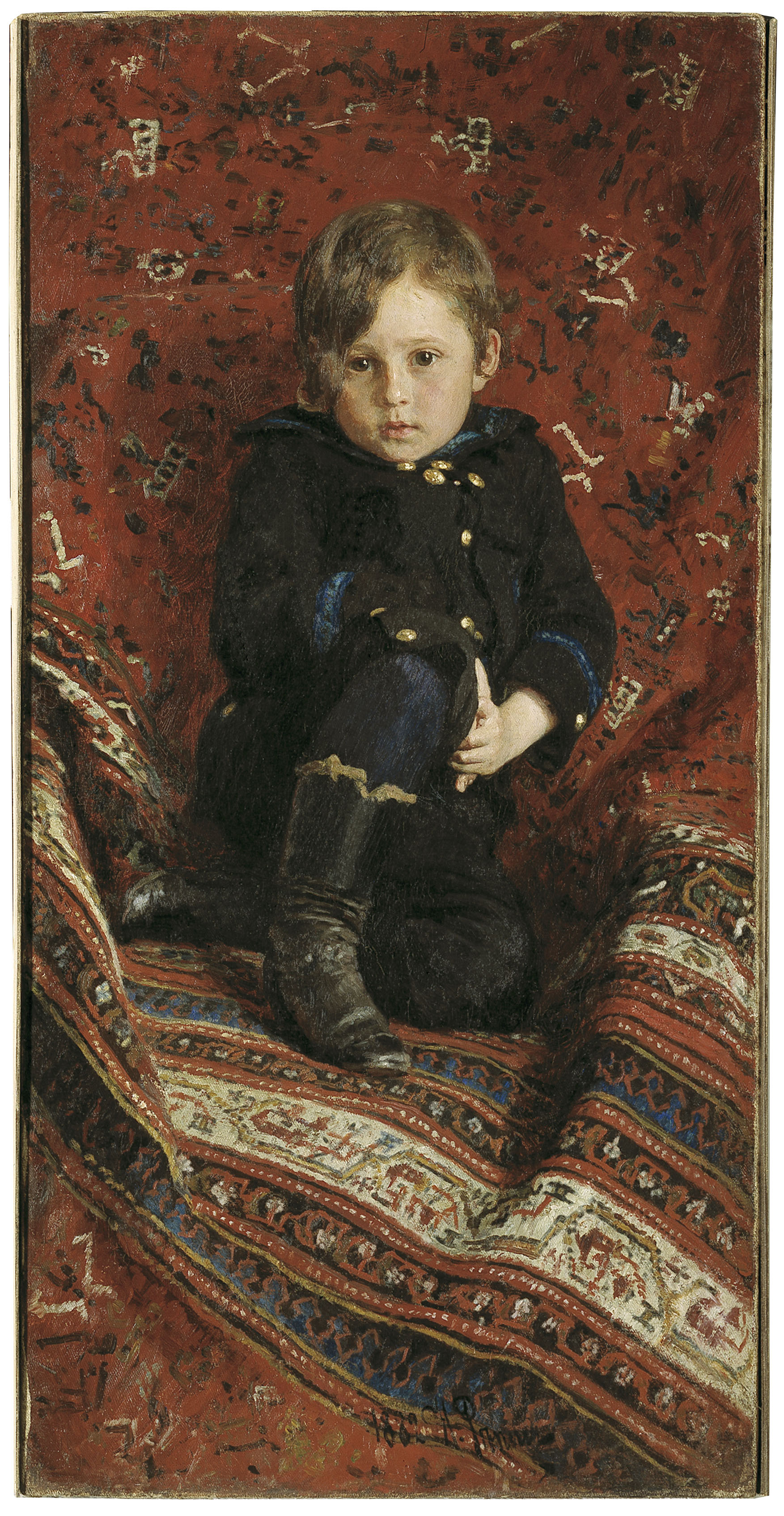 Илья Репин. Портрет Ю.И. Репина в детстве